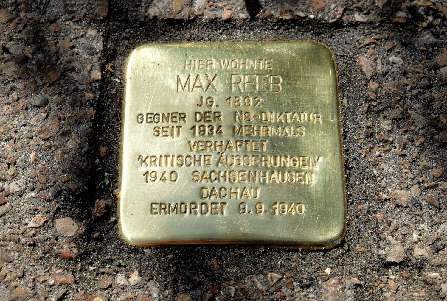 Stolperstein für Maximilian "Max" Josef Reeb, verlegt durch Gunter Demnig am 10.07.2020 - Foto: Frank Keller, Stolpersteininitiative Ellwangen